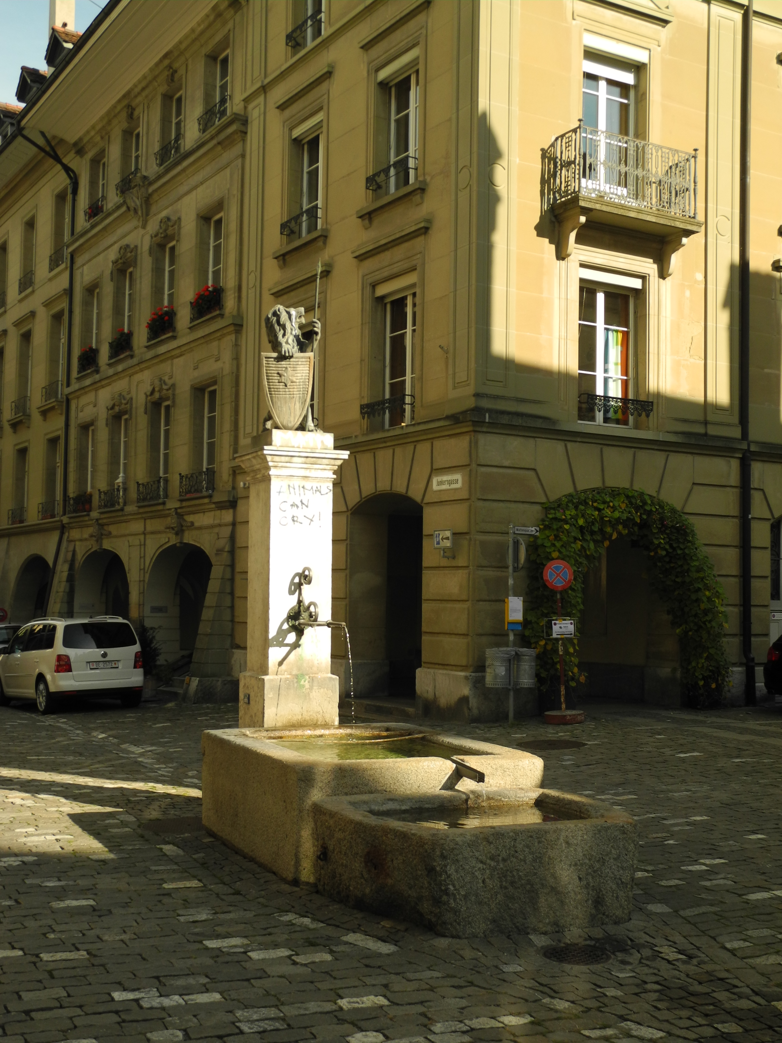 Brunnenstock mit Brunnenfigur eines Löwen mit Lanze in der linken und dem Schild mit dem Wappen der von Bubenberg in der rechten Pranke. Heutige Brunnenfigur aus bronziertem Zinkguss von 1869